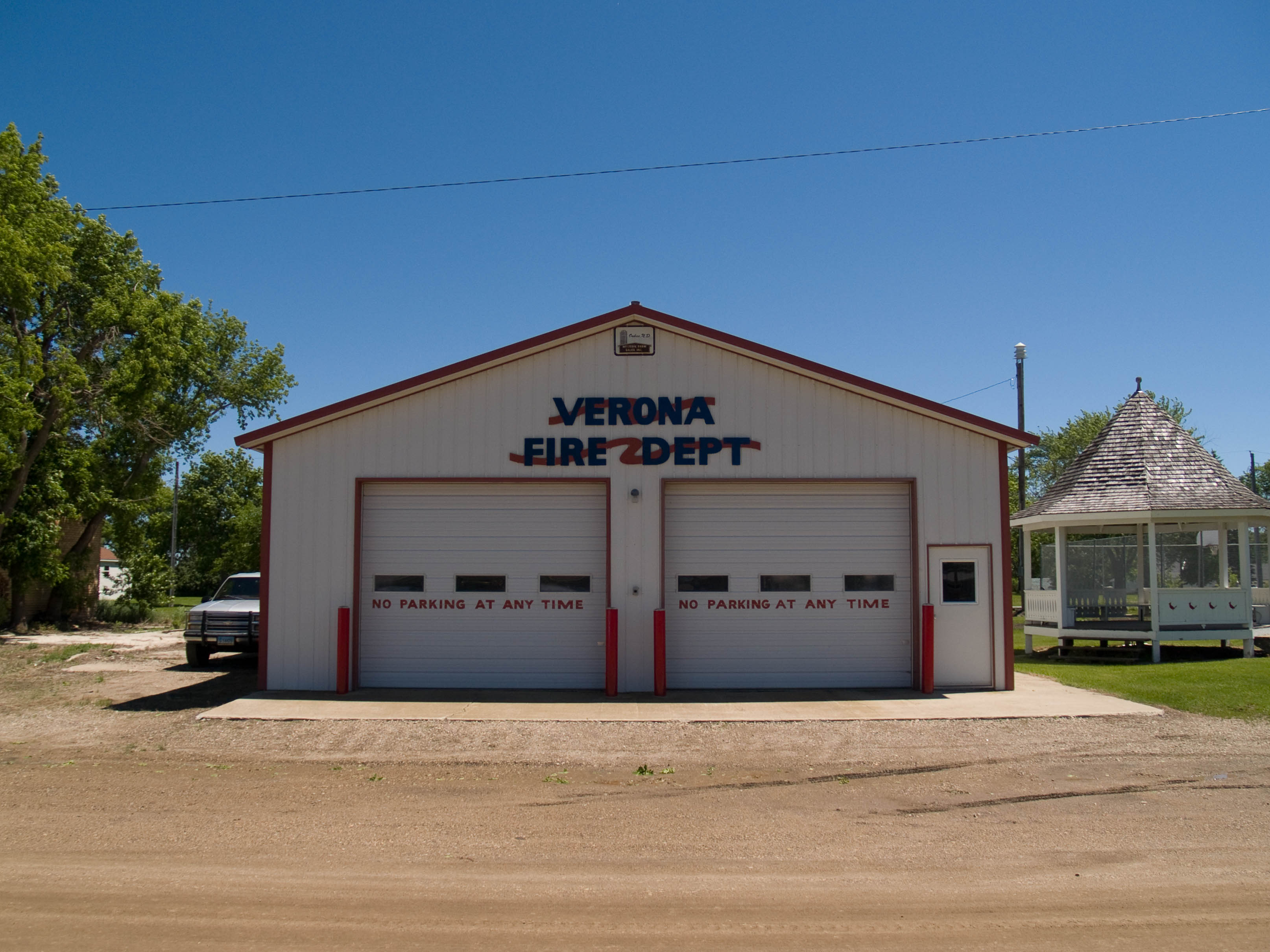 Fire department in Verona, North Dakota